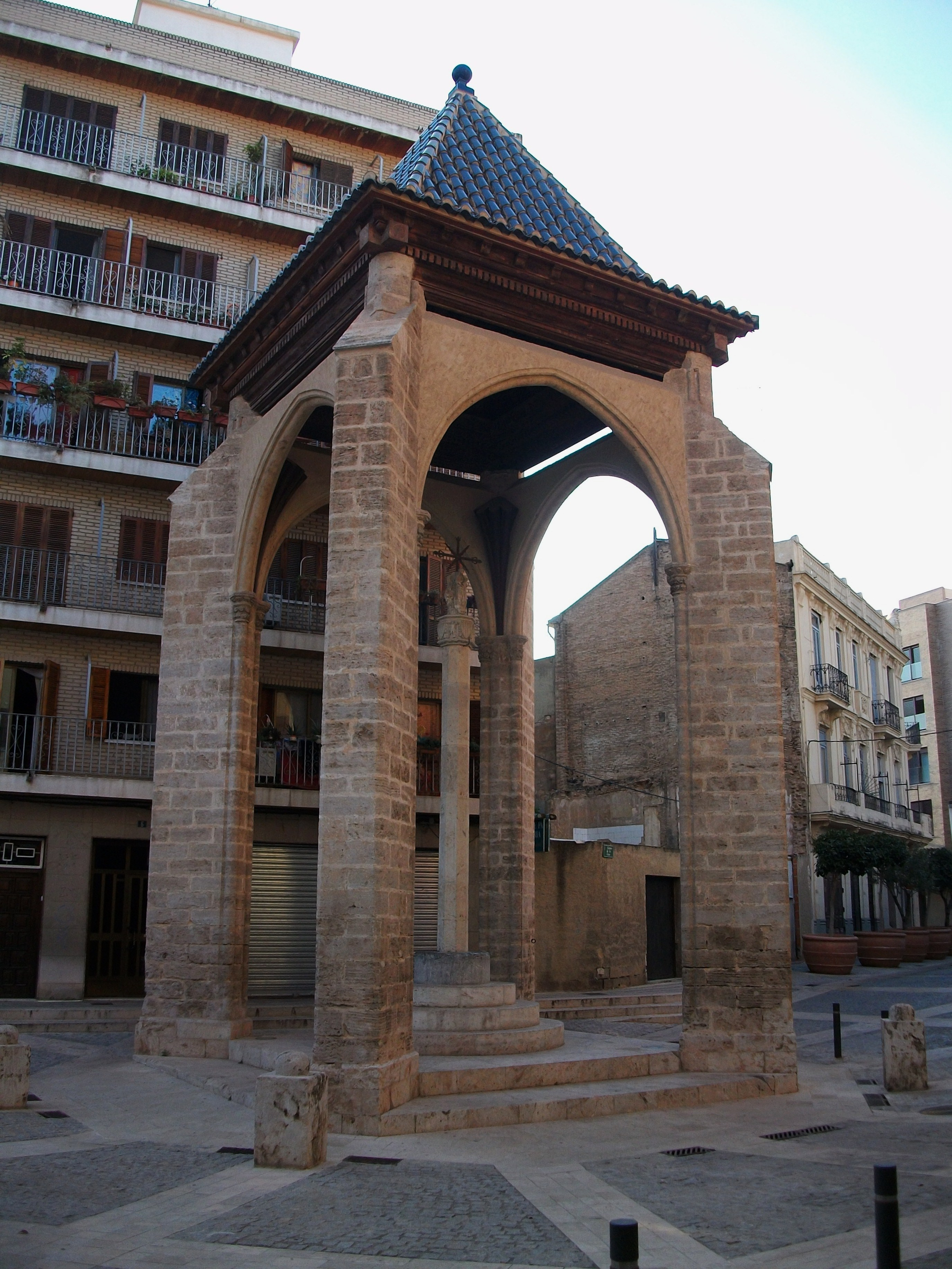 Creu Coberta de Mislata, l'Horta, País Valencià.